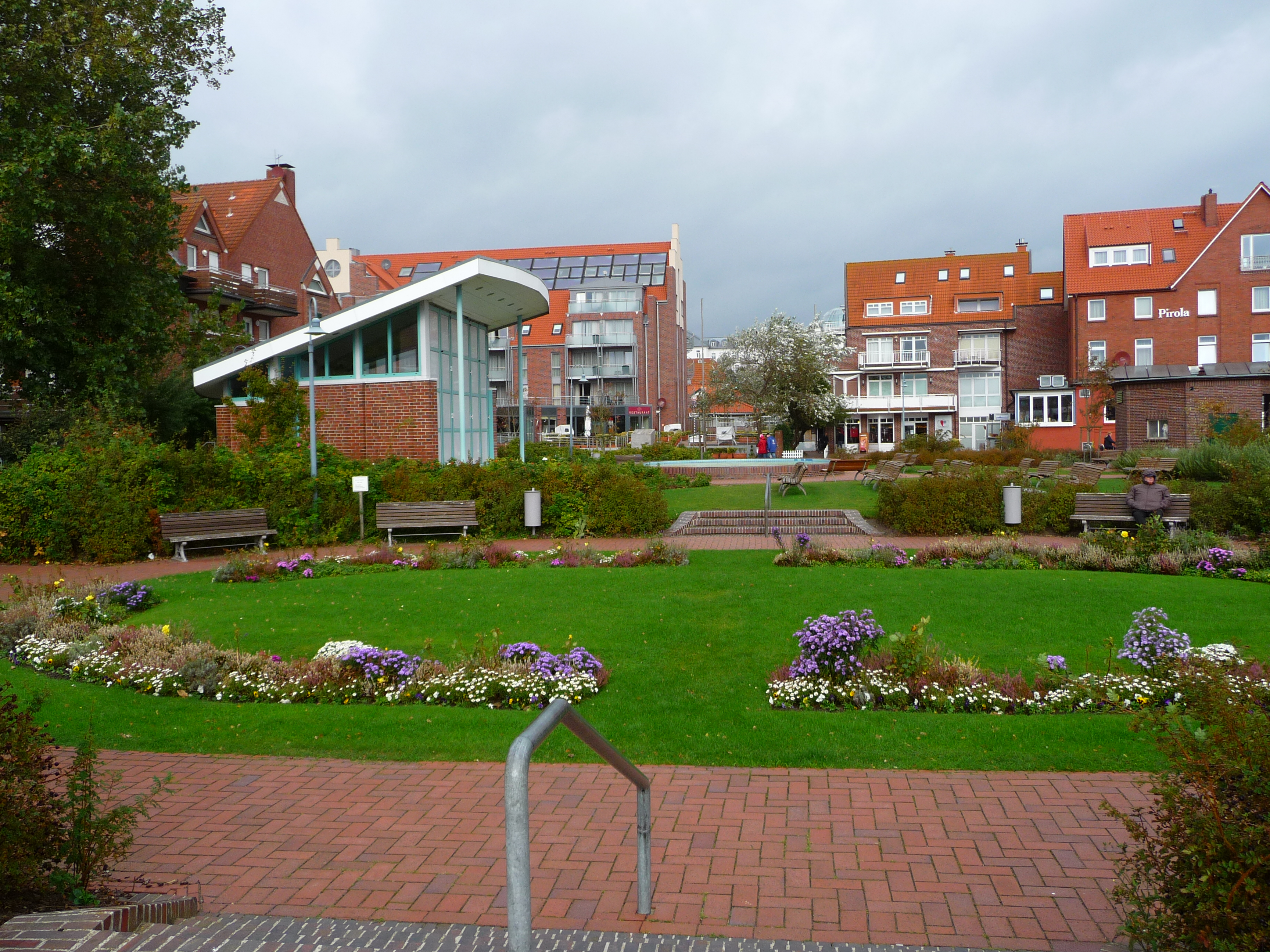 Kurplatz und Konzerpavillon auf der ostfriesischen Nordseeinsel Juist (Niedersachsen, Deutschland), im Hintergrund der bei Kindern sehr beliebte Schiffchenteich